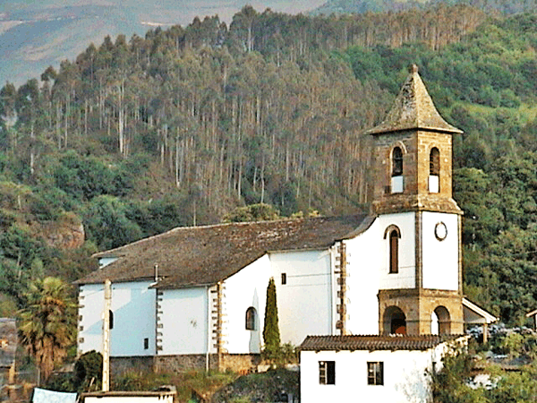 Imagen de la iglesia de San Pedro de Paredes